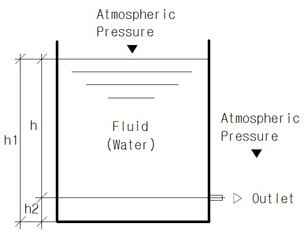 토리첼리의 정의에 사용되는 공식 설명 그림